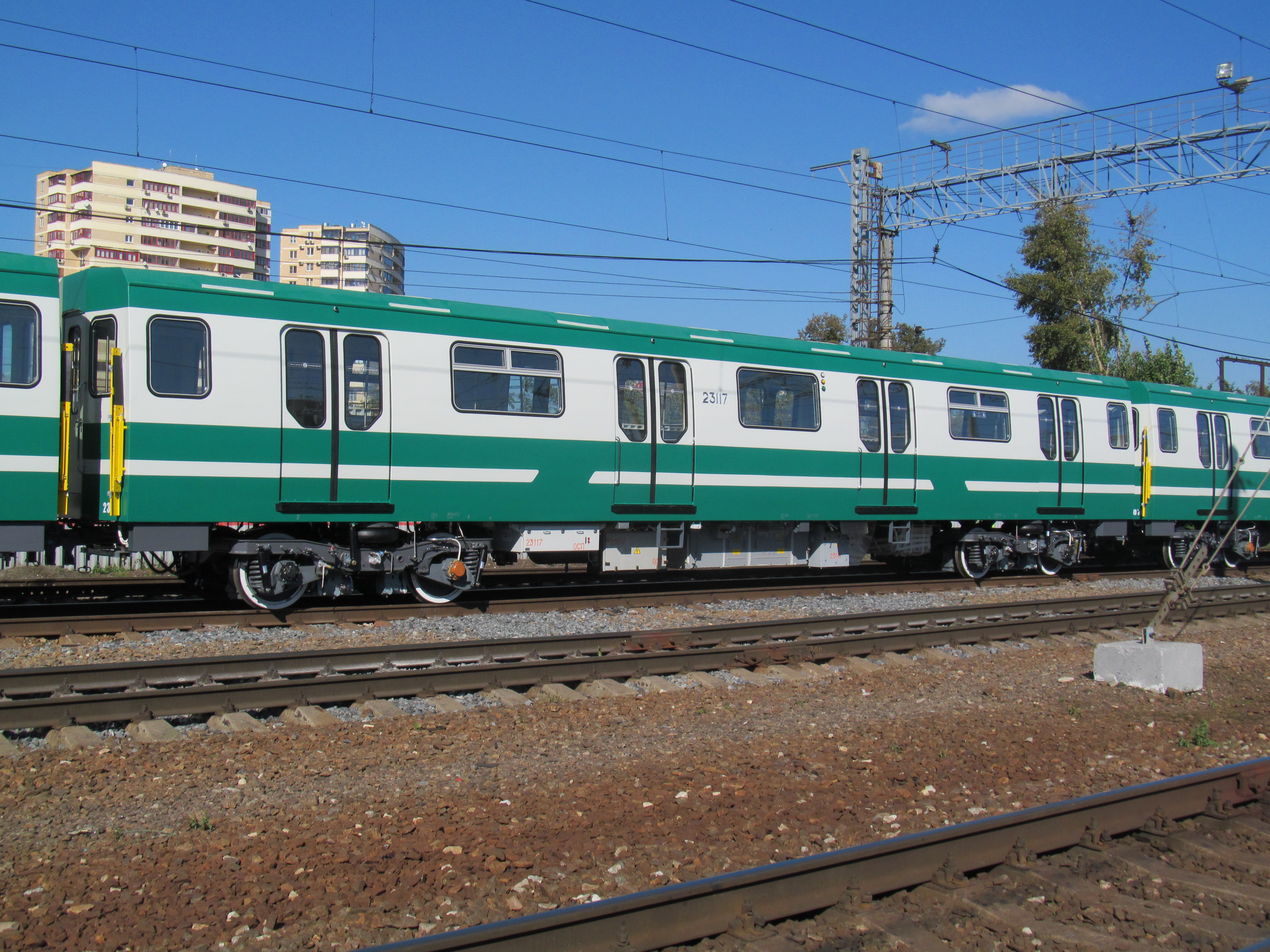 Метровагон 81-723.3 (моторный промежуточный) № 23117 на станции Мытищи (транспортировка)